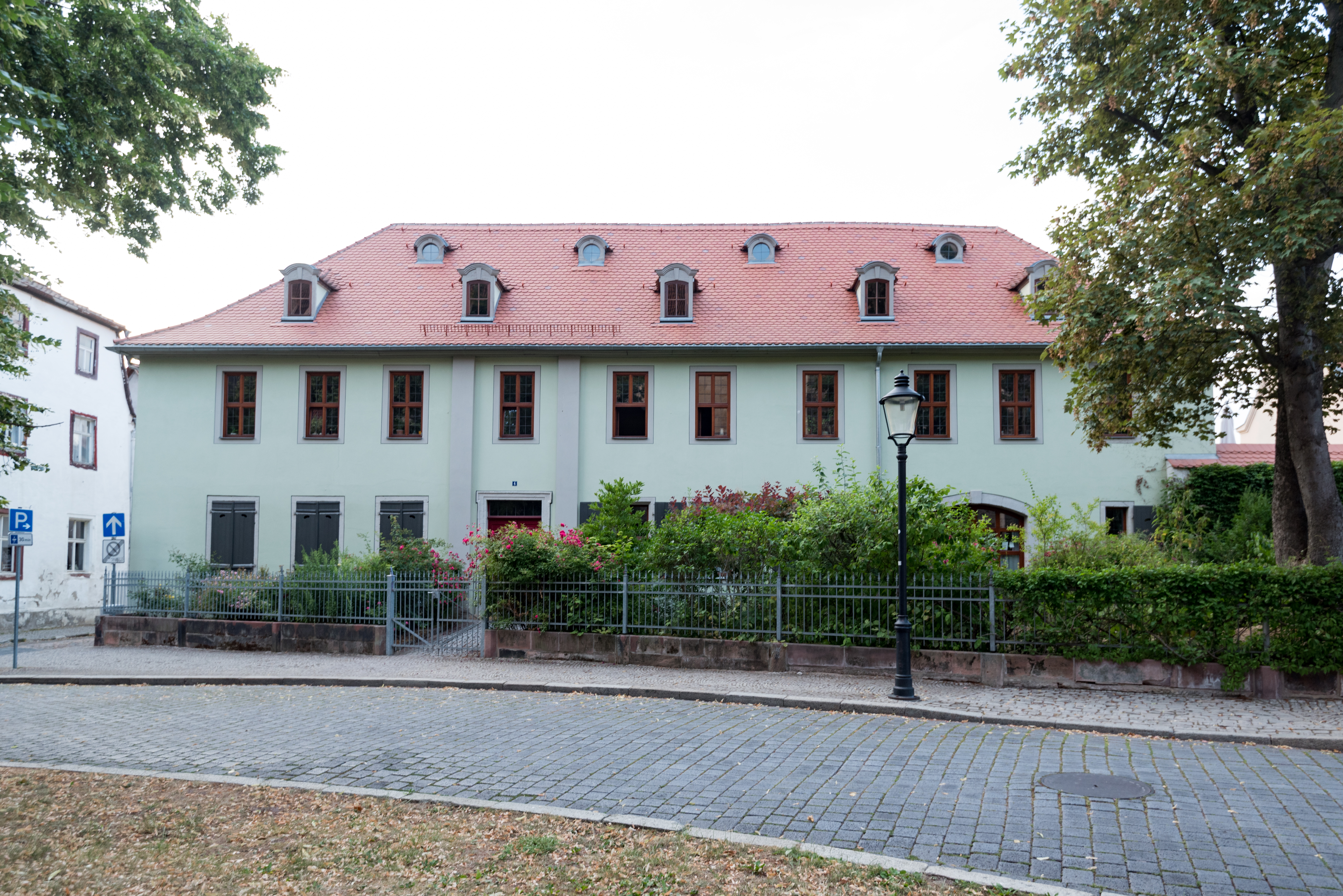 Naumburg (Saale), Domplatz 4